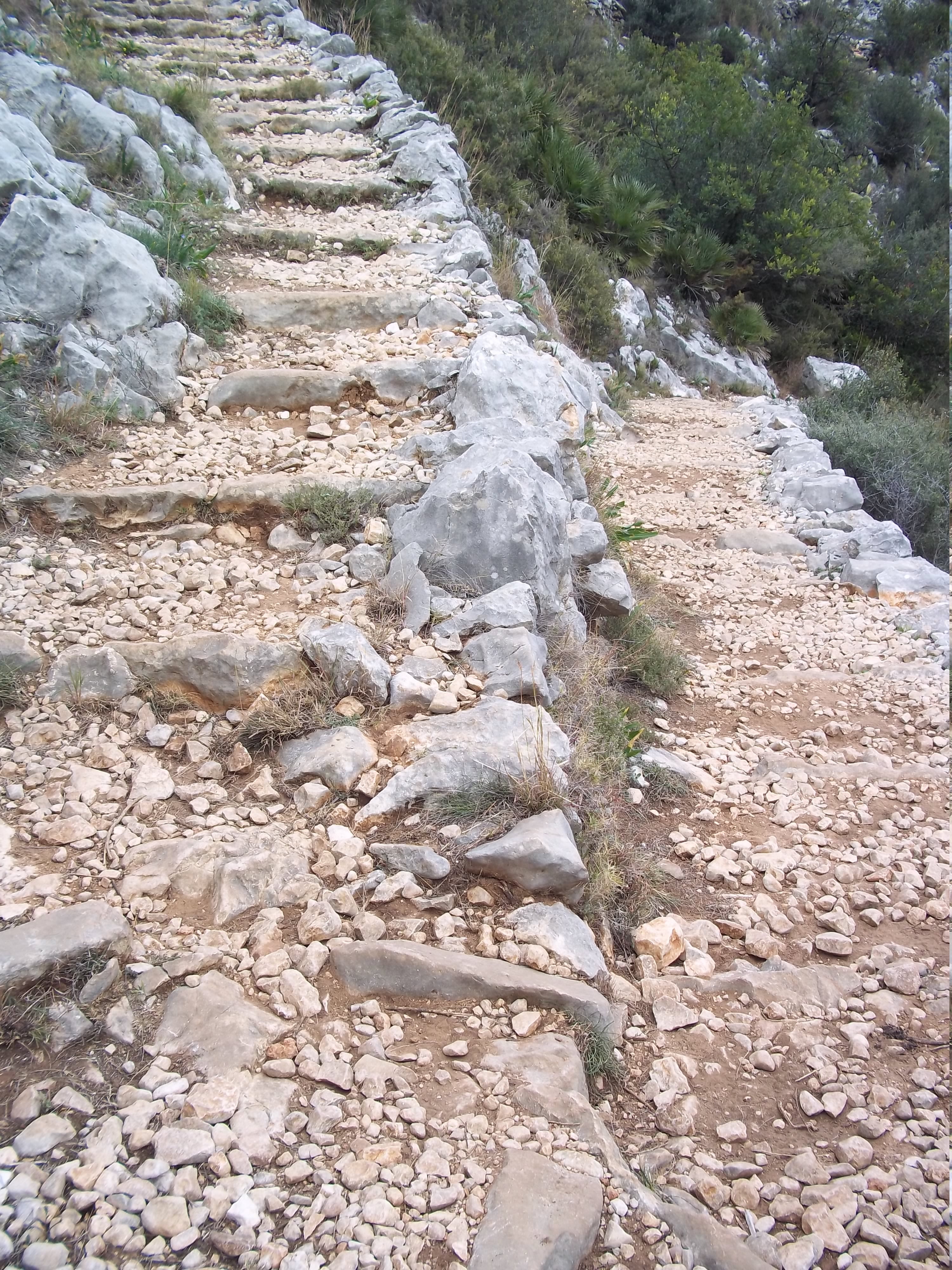 Diversos detalls del Barranc de l'Infern a la Vall de Laguar